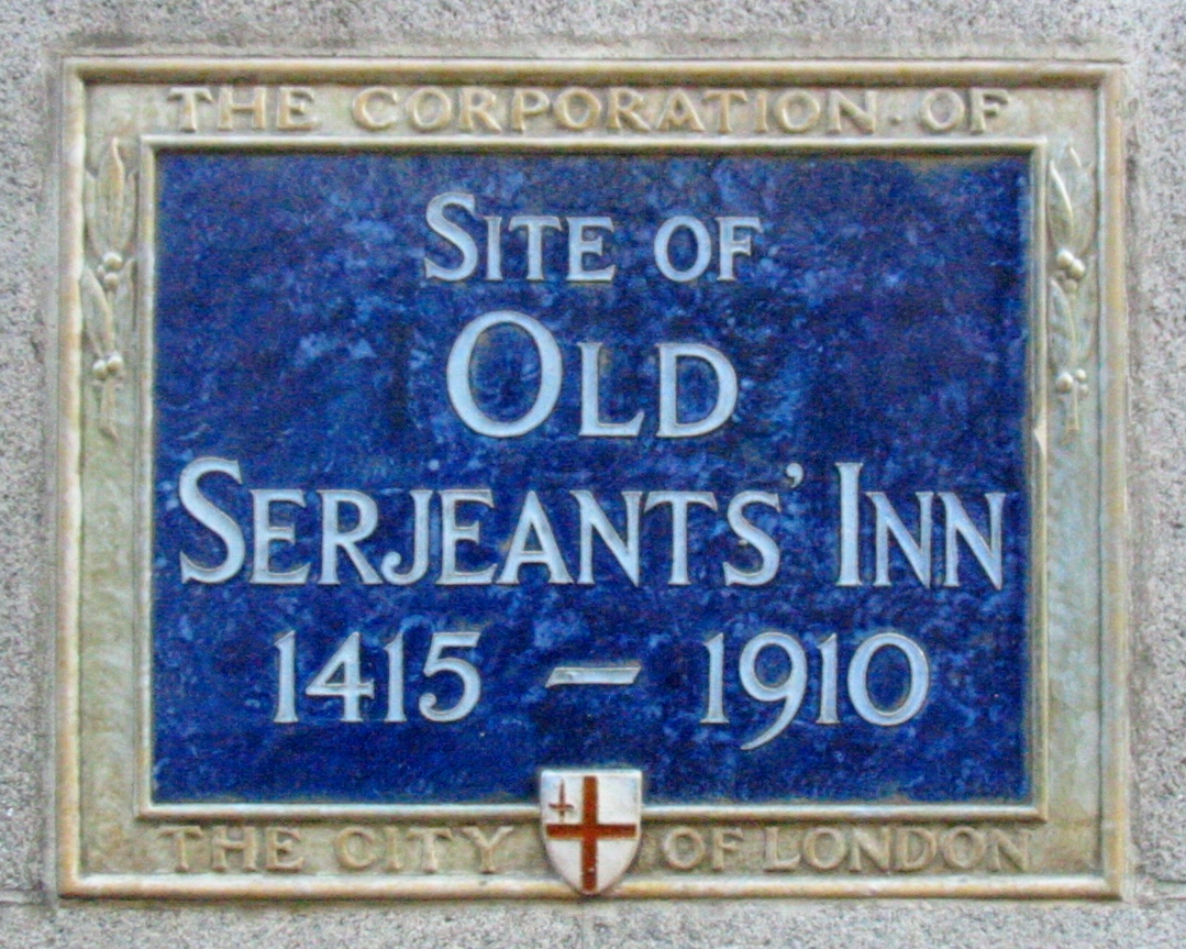 Nrf: Pliaque à Londres